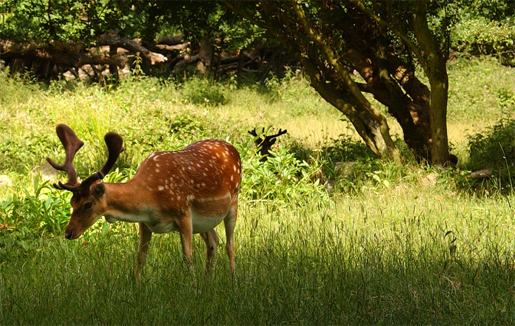 Dådyr på Romsø